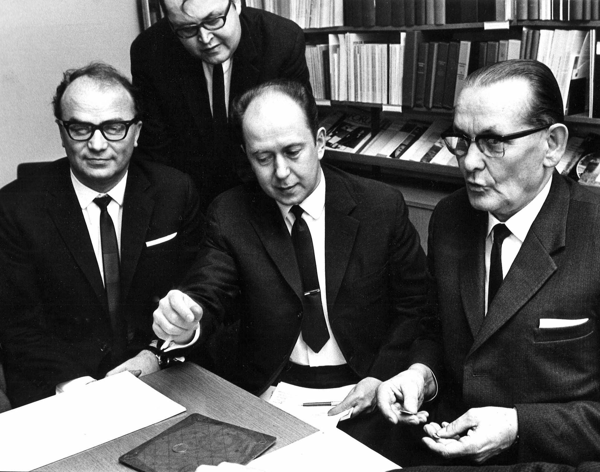 Valtiovarainministeri Eino Raunio (oik.) tarkastelee uutta nikkelimarkkaa ja alumiinipenniä. Metallirahoja esittelemässä valtiosihteeri Paul Paavela (vas.), tiedotussihteeri Jukka Rusi, toinen valtiovarainministeri Ele Alenius ja valtiovarainministeri Raunio.